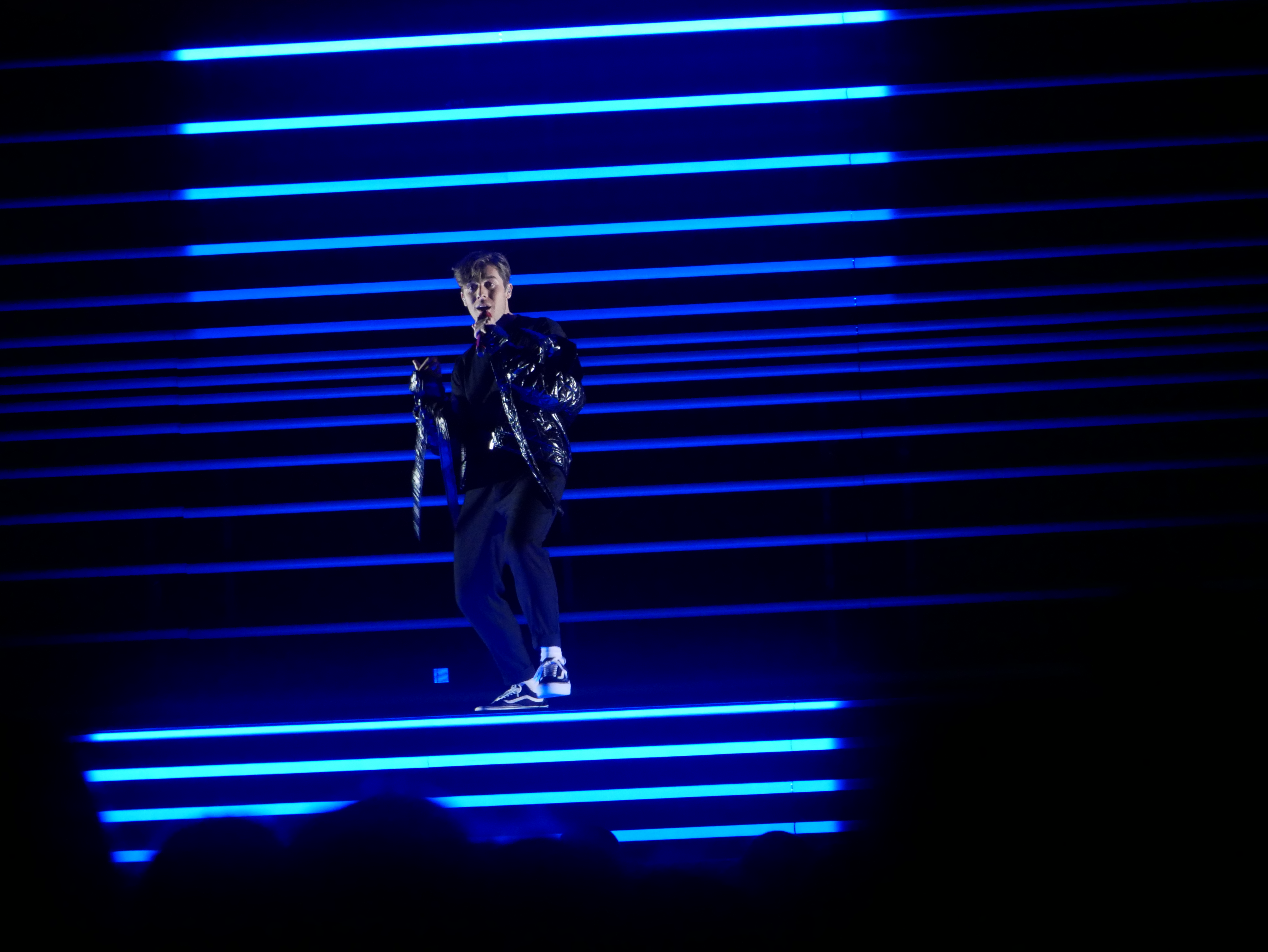 Melodifestivalen 2018, Deltävling 1, Löfbergs Arena, Karlstad Benjamin Ingrosso, Melodifestivalen 2018